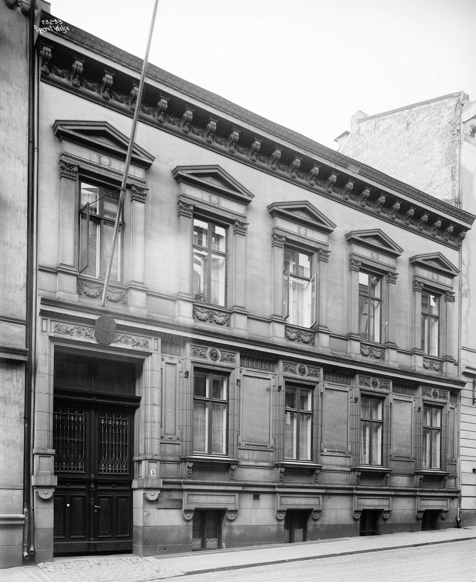 Huitfeldts gate 3 (1877) i 1923. Gården er senere påbygget en etasje.